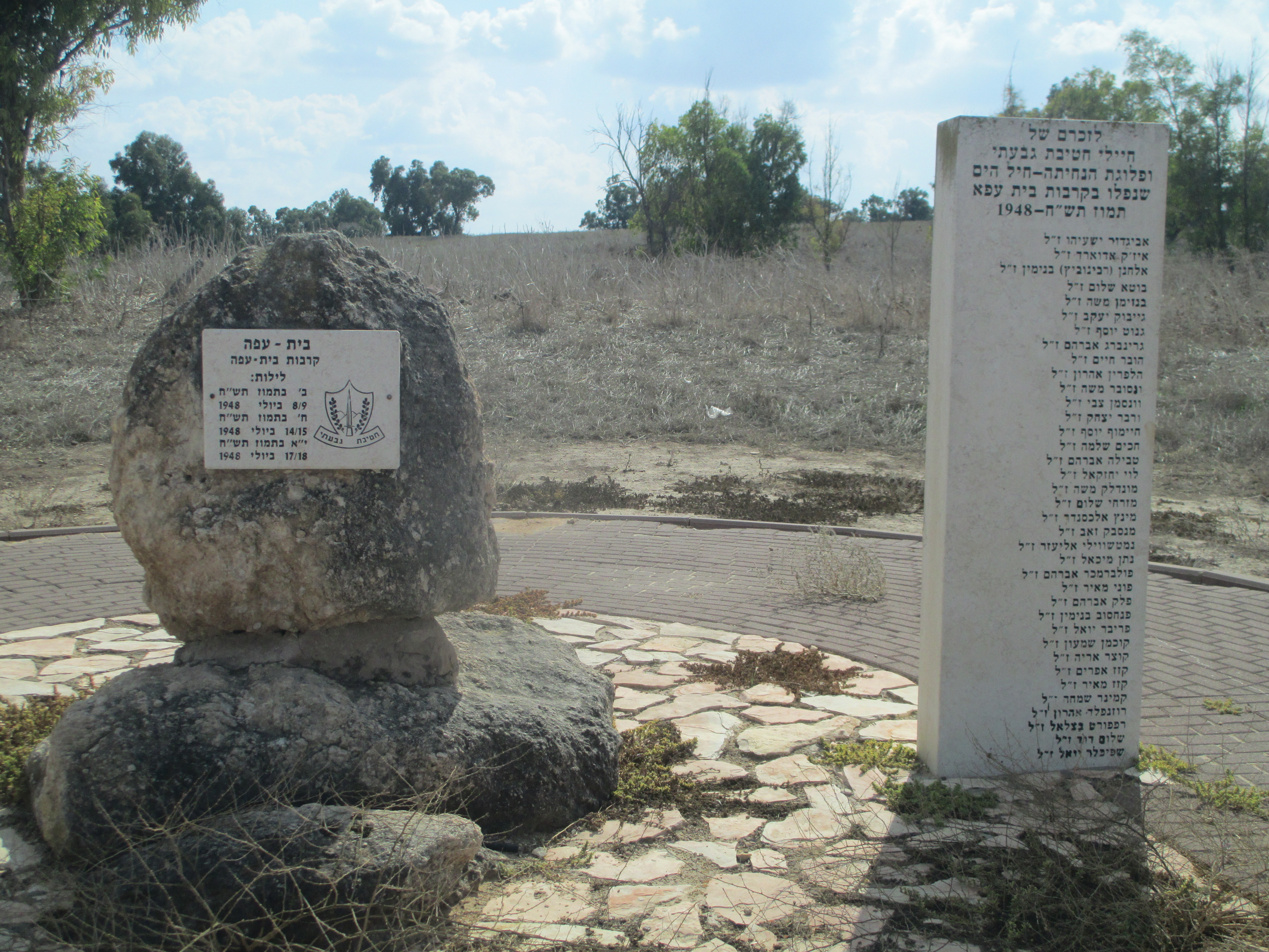 אנדרטת קרבות בית עפה במושב יד נתן